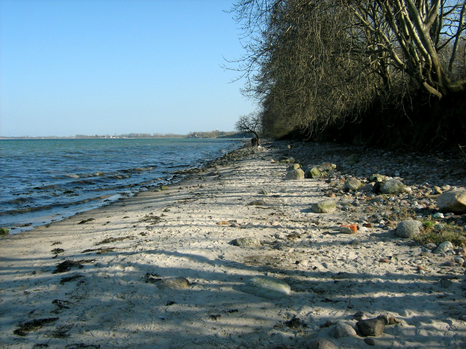 Strandabschnitt in Steinberghaff, beach in Steinberghaff